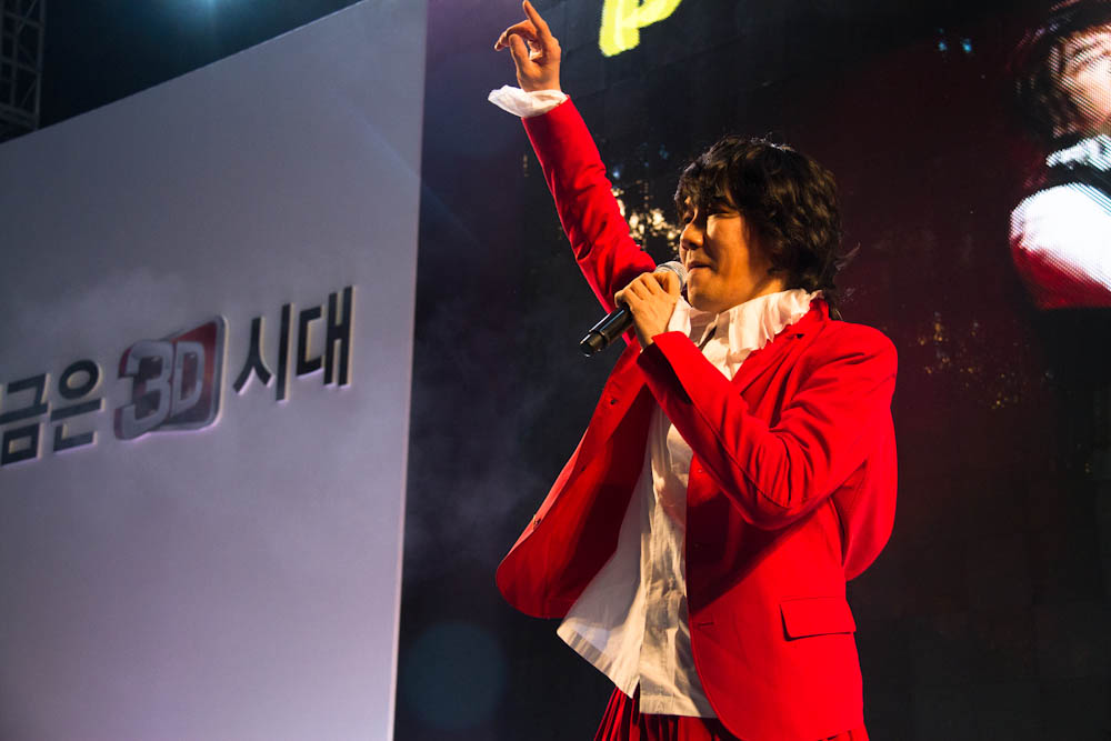 Lg전자가 3월 31일, 4월 1일 양일간 서울 잠실동 롯데월드 아이스링크에서 'lg 시네마3d 월드페스티벌'을 성황리에 개최했다. ※ LG전자 뉴스룸 에서 관련 보도자료를 확인실 수 있습니다.